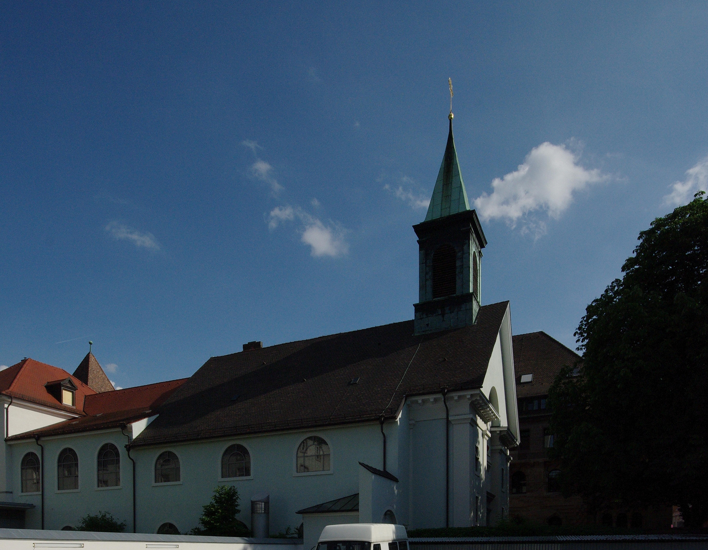 Blick auf die Konviktkirche und das Collegium Borromaeum